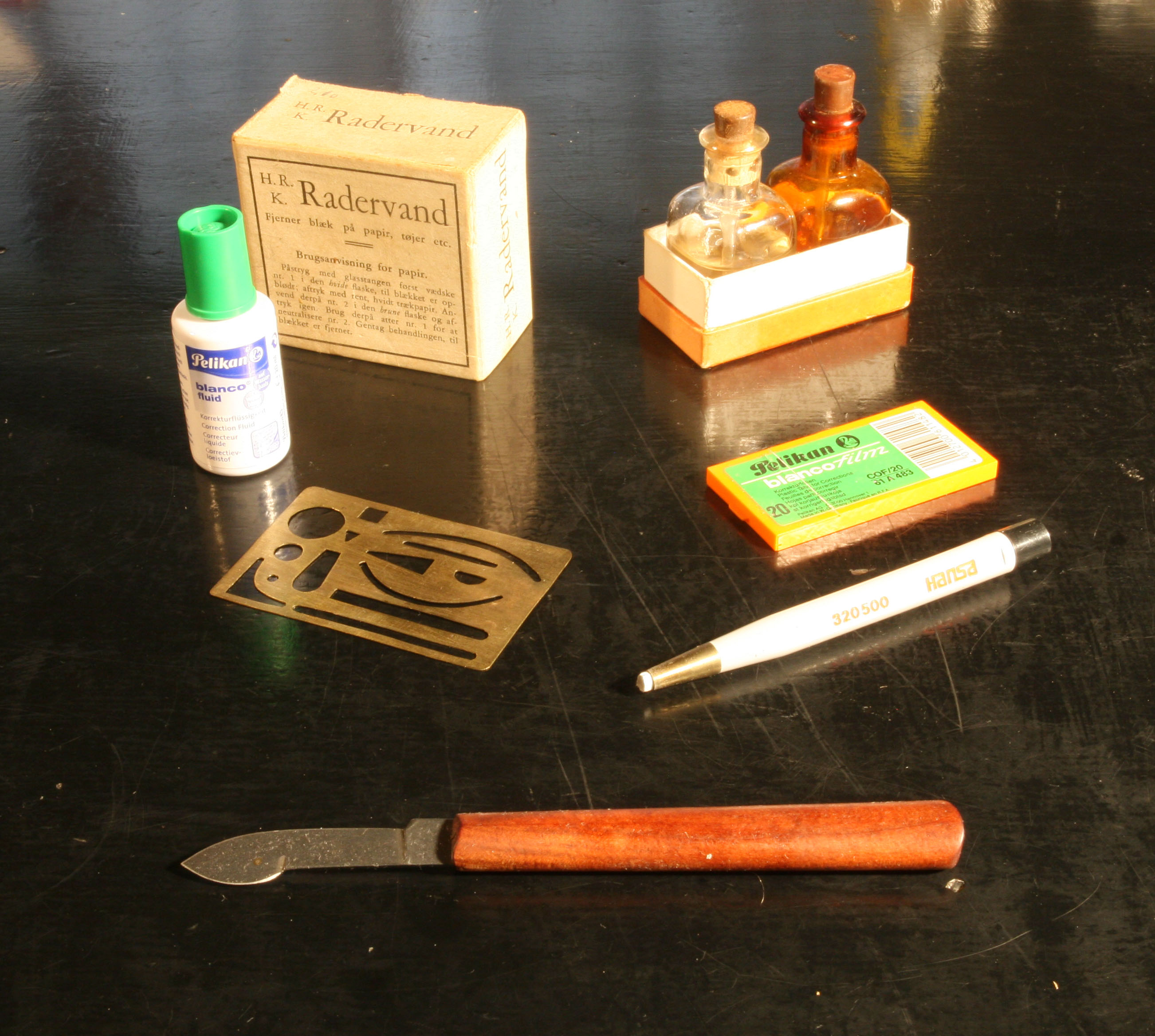 Udstyr til radering af skrift og lignende